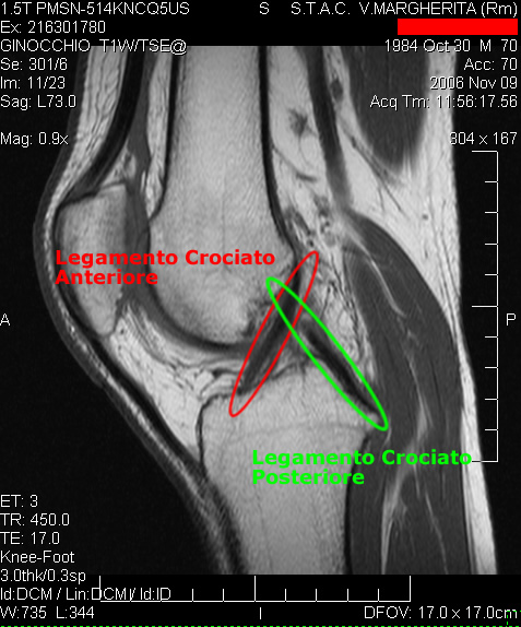 Immagine del legamento crociato anteriore e posteriore a seguito di una risonanza magnetica